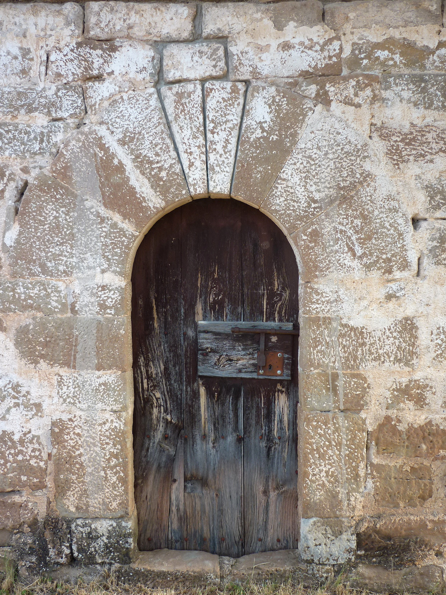 Porta d'entrada de la capella de Santa Magdalena de les Planes de Besora, a Navès (Solsonès)